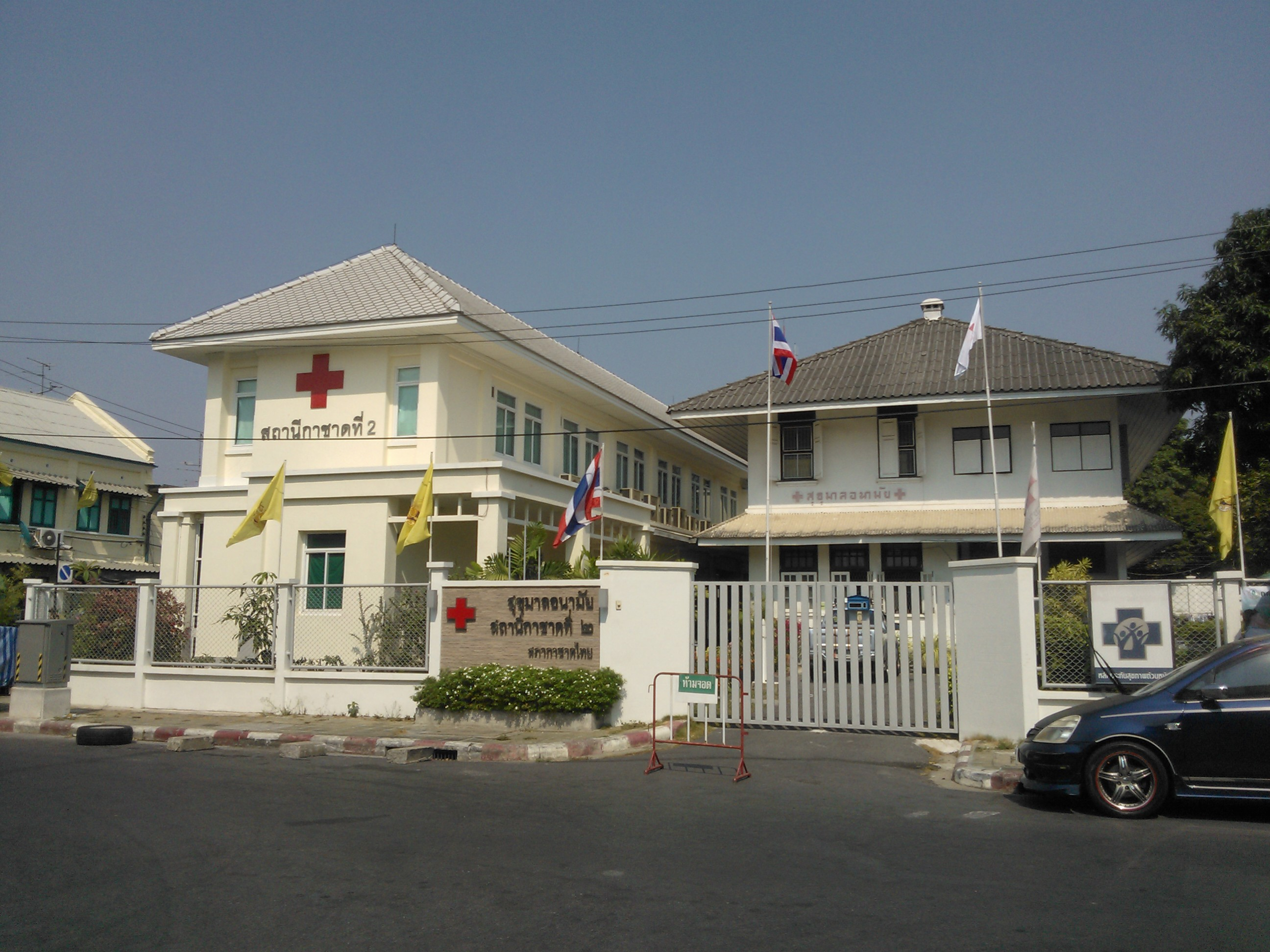 PHRAENG PHUTHON